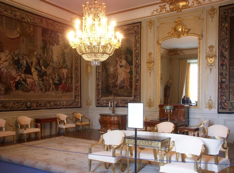 Stockholms slott, Meleagersalongen